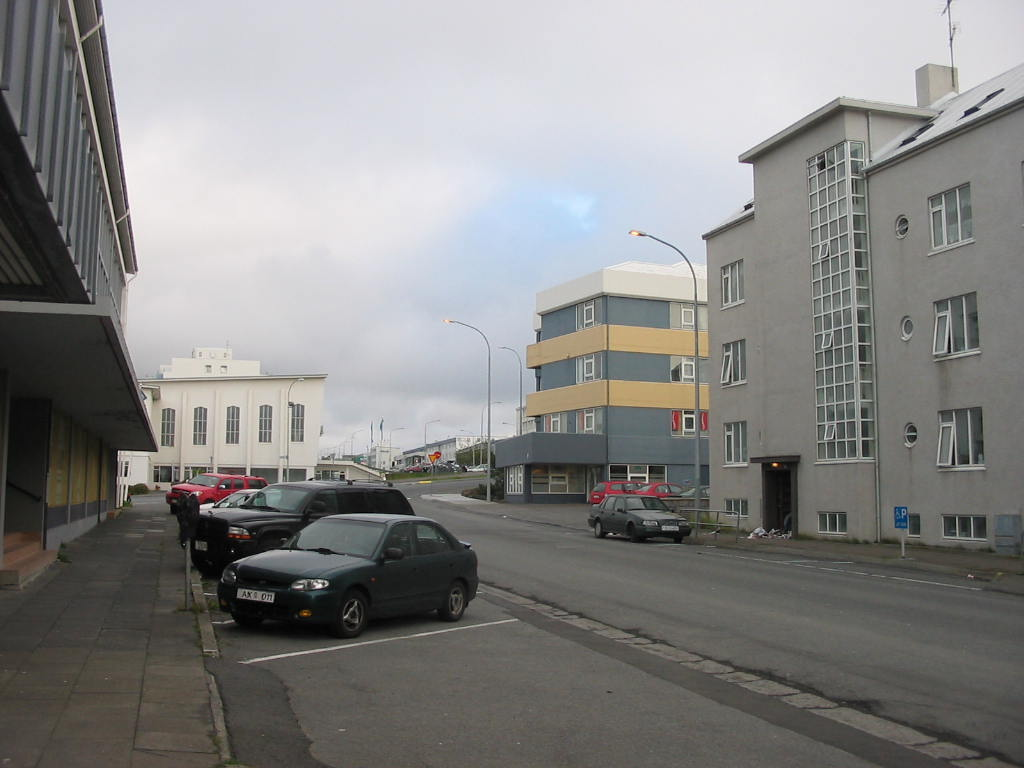 Skúlagata street in Reykjavik, Iceland